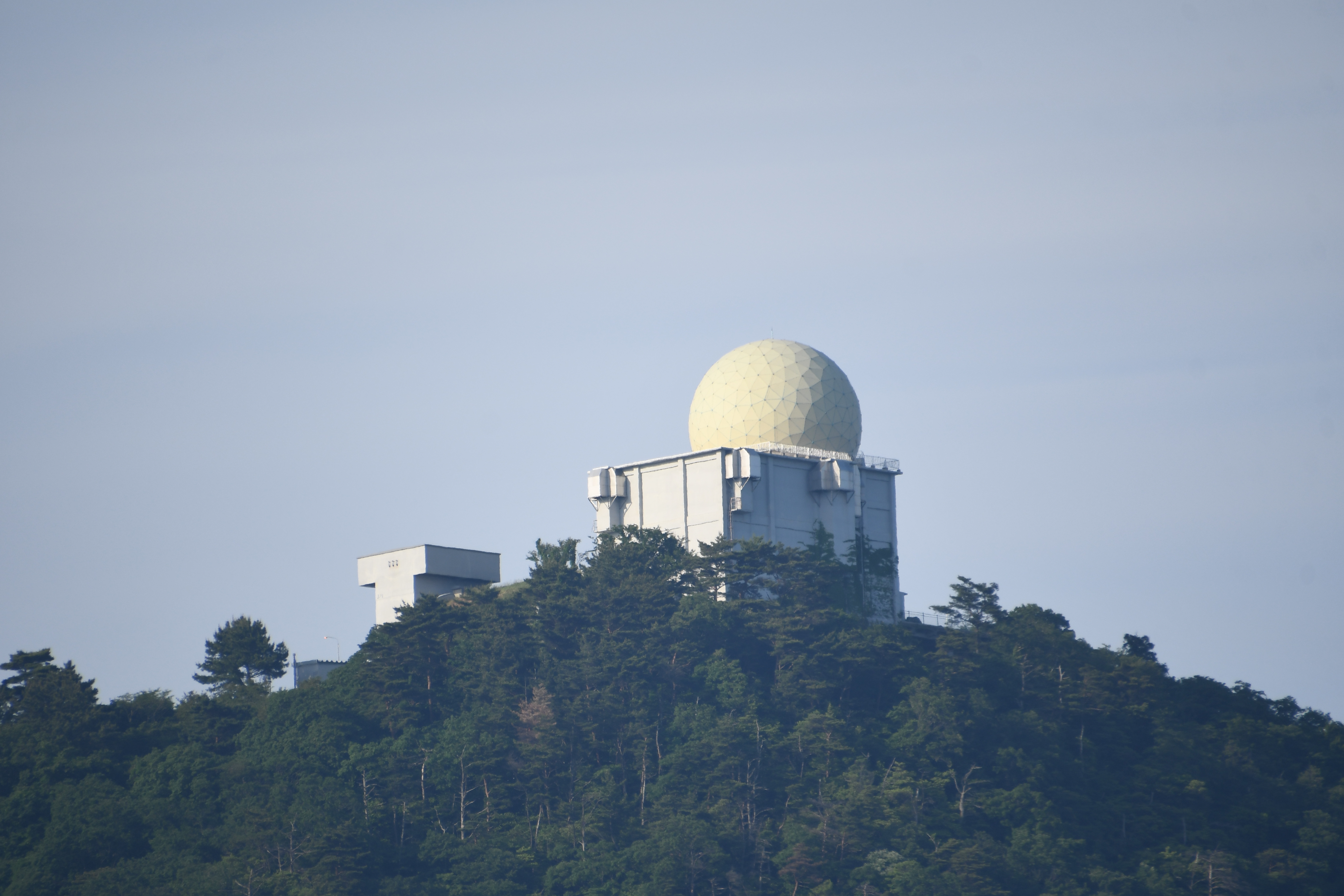 航空自衛隊 高尾山分屯基地 J/FPS-4 3次元レーダー装置のレドーム。2019年6月1日 境港から撮影。 Nikon D7500